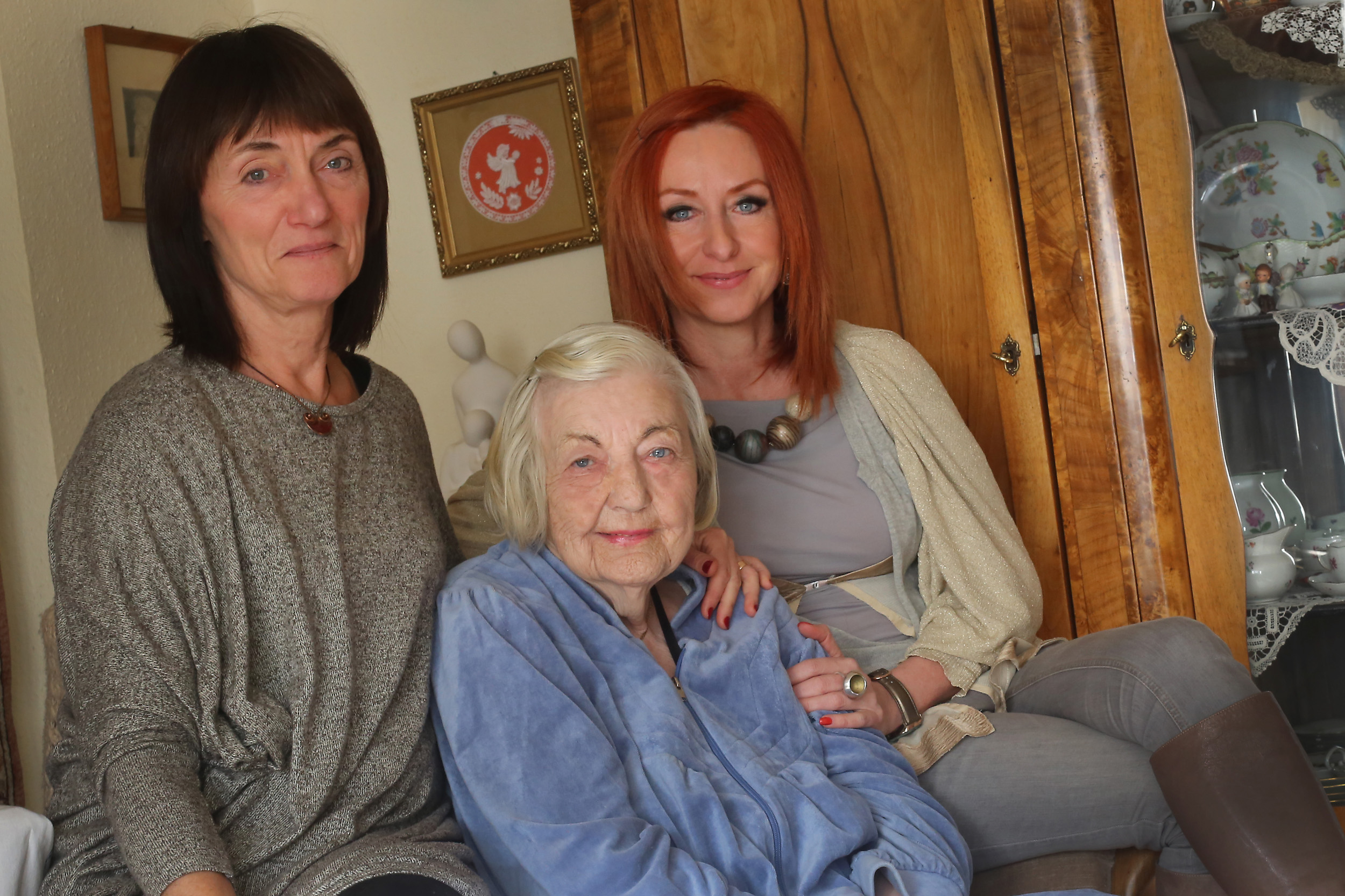 Kéri Ibolya, Lux Elvira és Soponyai-Nagy Krisztina a Lux Babaprogram megálmodói